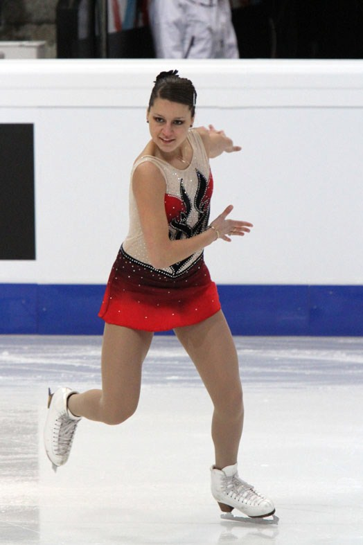 Sabina Măriuţă at the 2011 European Figure Skating Championships